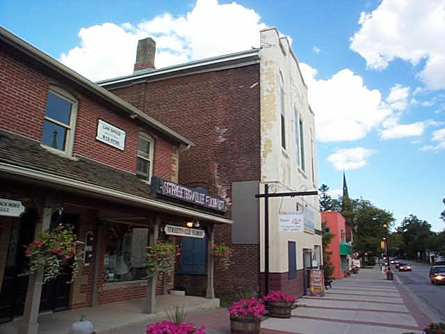 Das historische Streetsville in Mississauga / Kanada